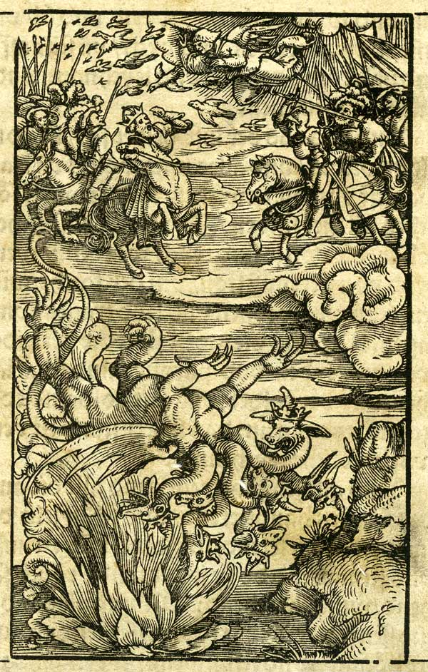 Die Zwinglibibel von 1531